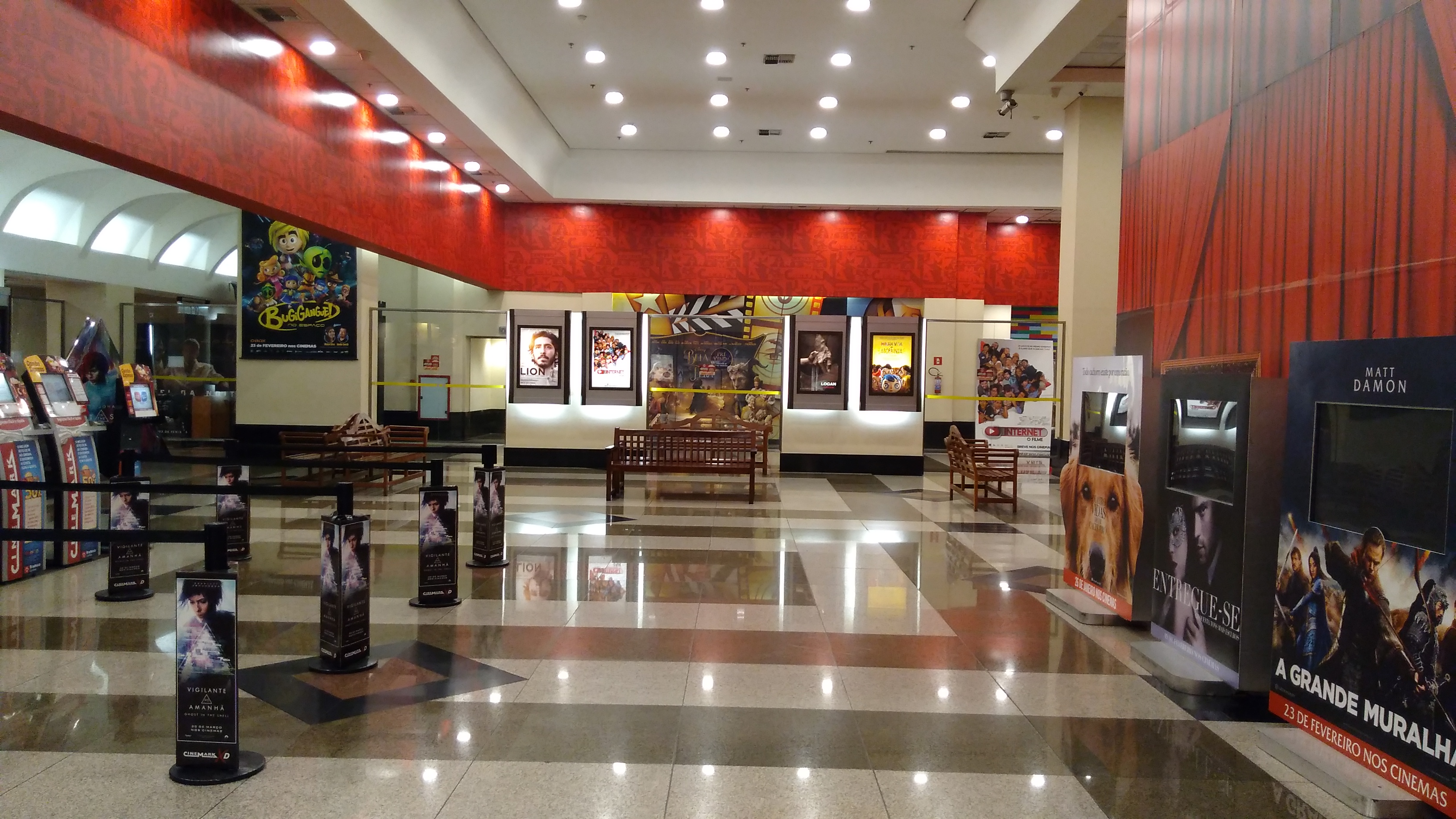 Saguão de entrada do Cinemark Metrô Santa Cruz de São Paulo, SP